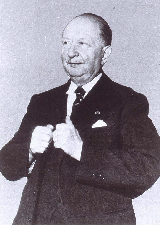 Lucien Febvre, professeur à la Faculté des lettres de Strasbourg. Bibliothèque nationale et universitaire de Strasbourg